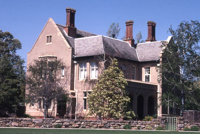 st peters college, adelaide, australia